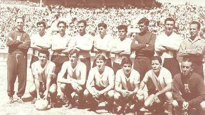 Selección Argentina durante el Campeonato Sudamericano 1963